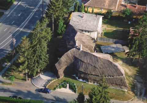 Bak, Hungary, aerial photography